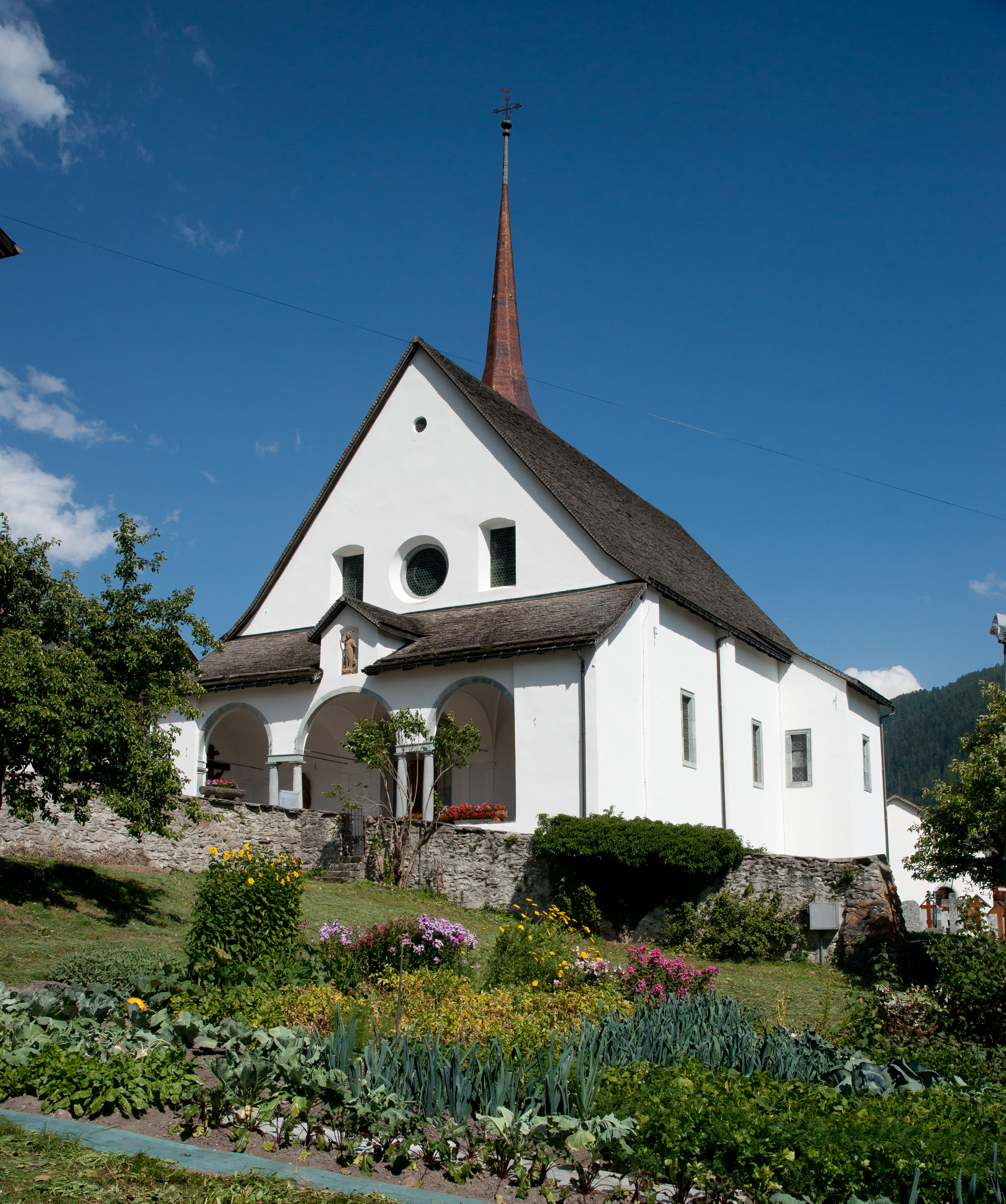 Münster-Geschinen. Église Sainte-Marie.